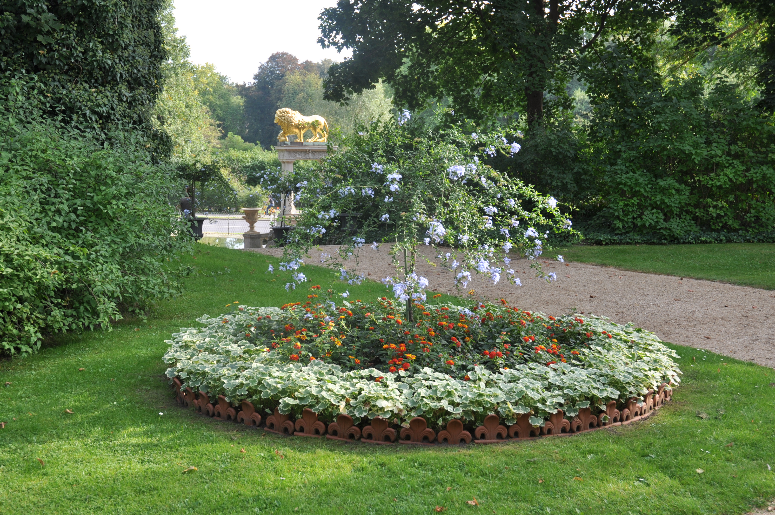 Beet auf der Schlossterrasse in Klein-Glienicke